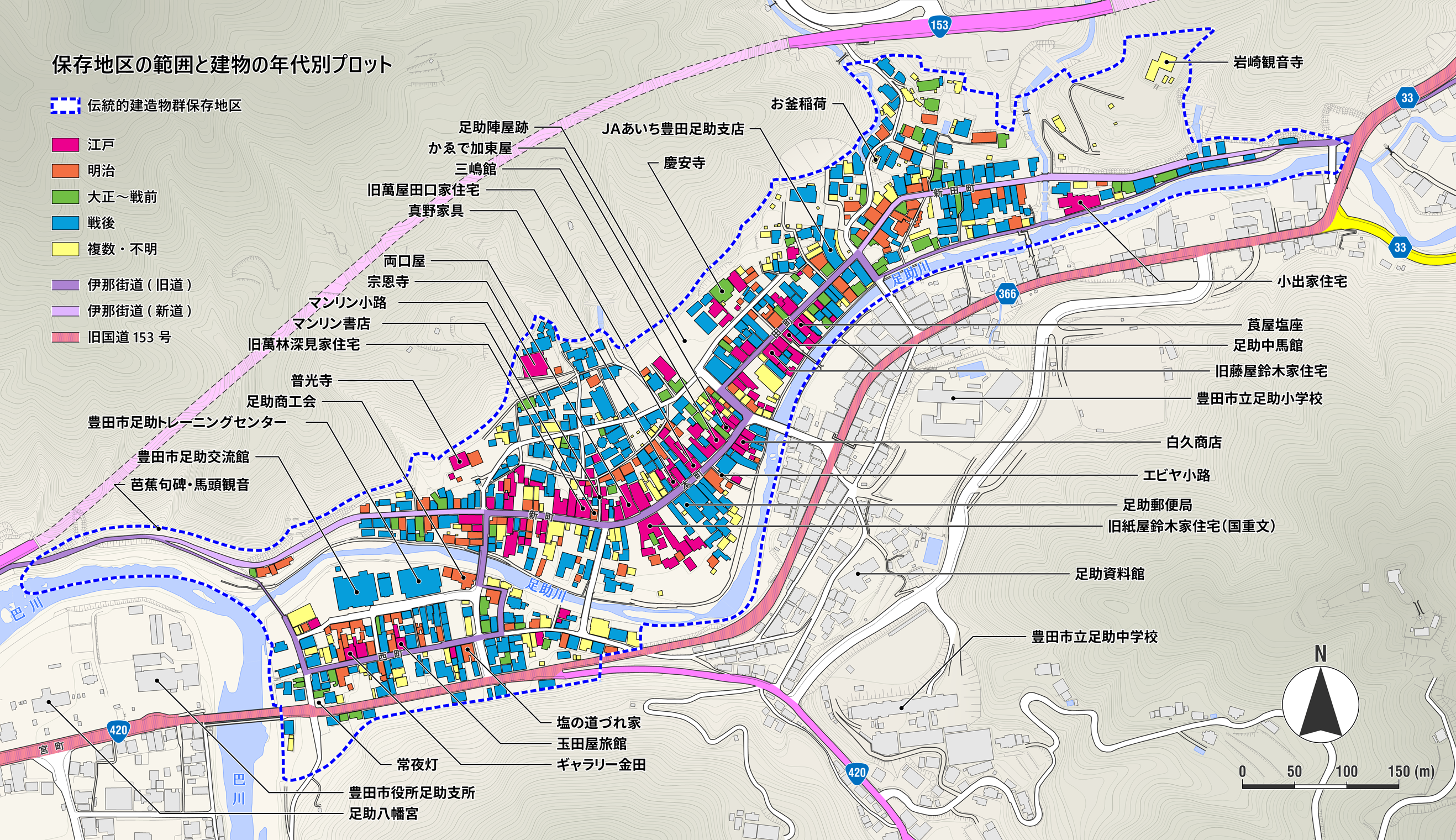 足助伝統的建造物群保存地区の範囲と建物の年代別プロット（2019年（平成31年）2月現在） （『足助（伝統的建造物群保存対策調査報告書）』（足助伝統的建造物調査会編集、豊田市教育委員会発行、2010年（平成22年）12月）に掲載の「保存地区の範囲と建物の年代別プロット」を参照及び一部改変。）